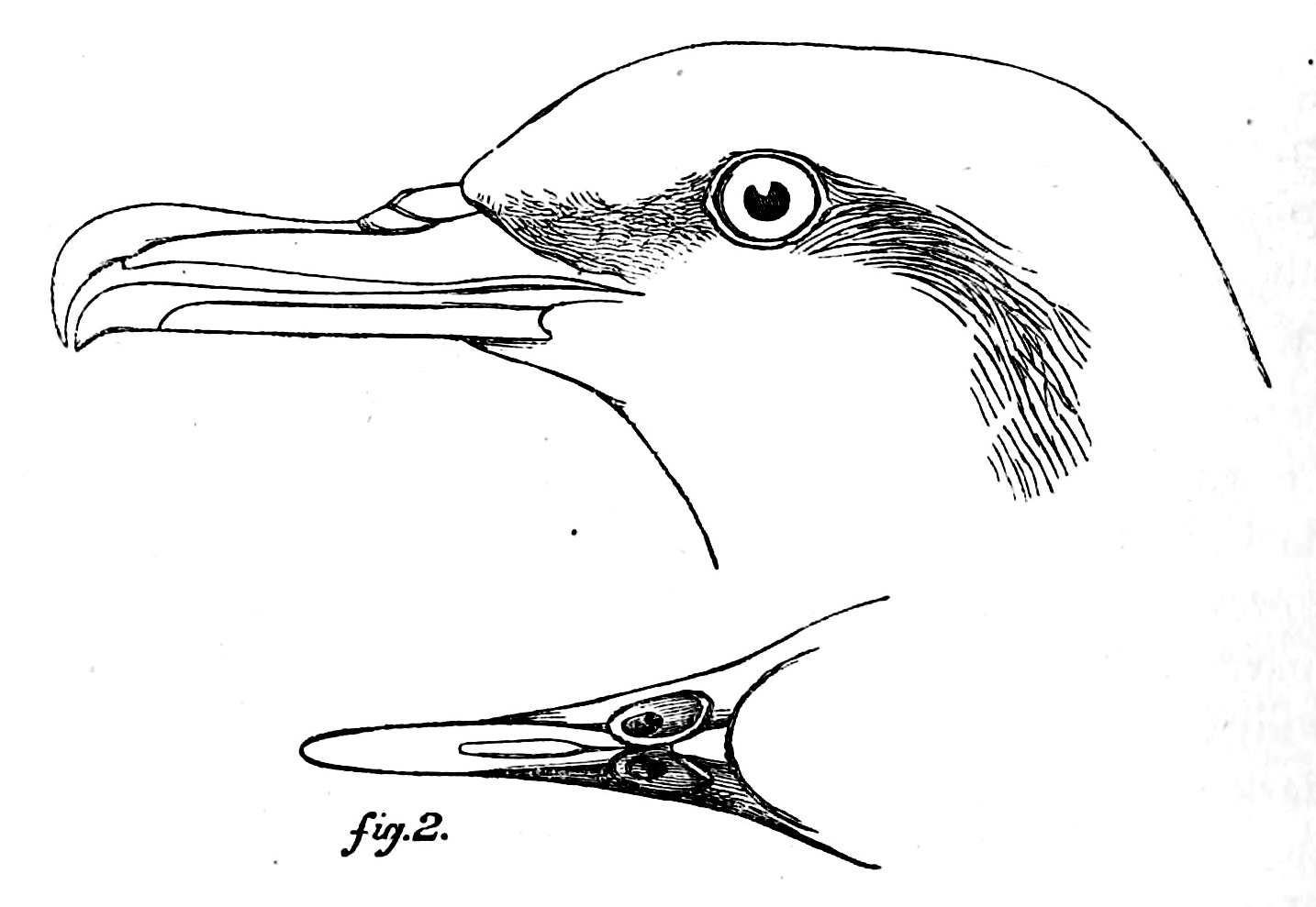 « Puffinus obscurus » = Puffinus lherminieri